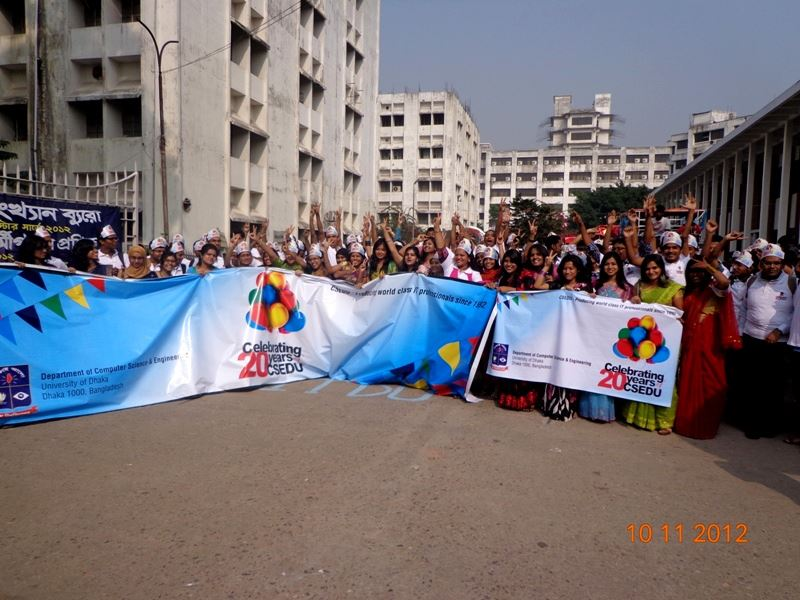 সি এস ই ঢাকা বিশ্ববিদ্যালয় এর ২০ বছর উদযাপন উৎসব